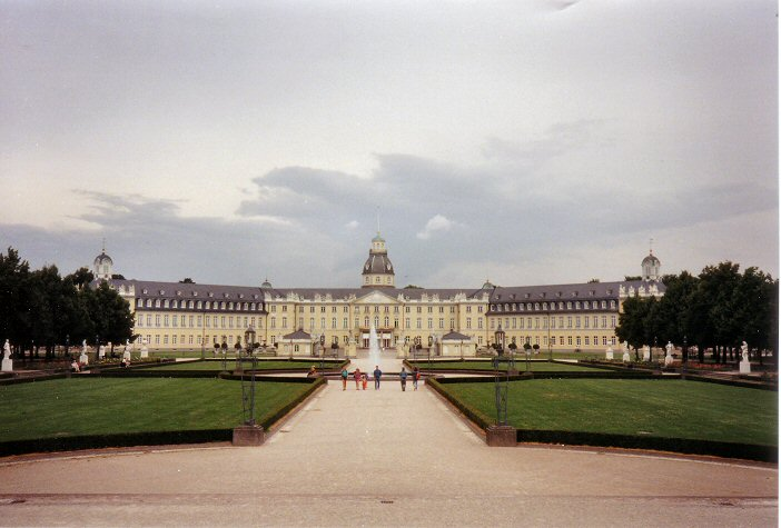 Slot Karlsruhe. Eigen foto, juli 1995